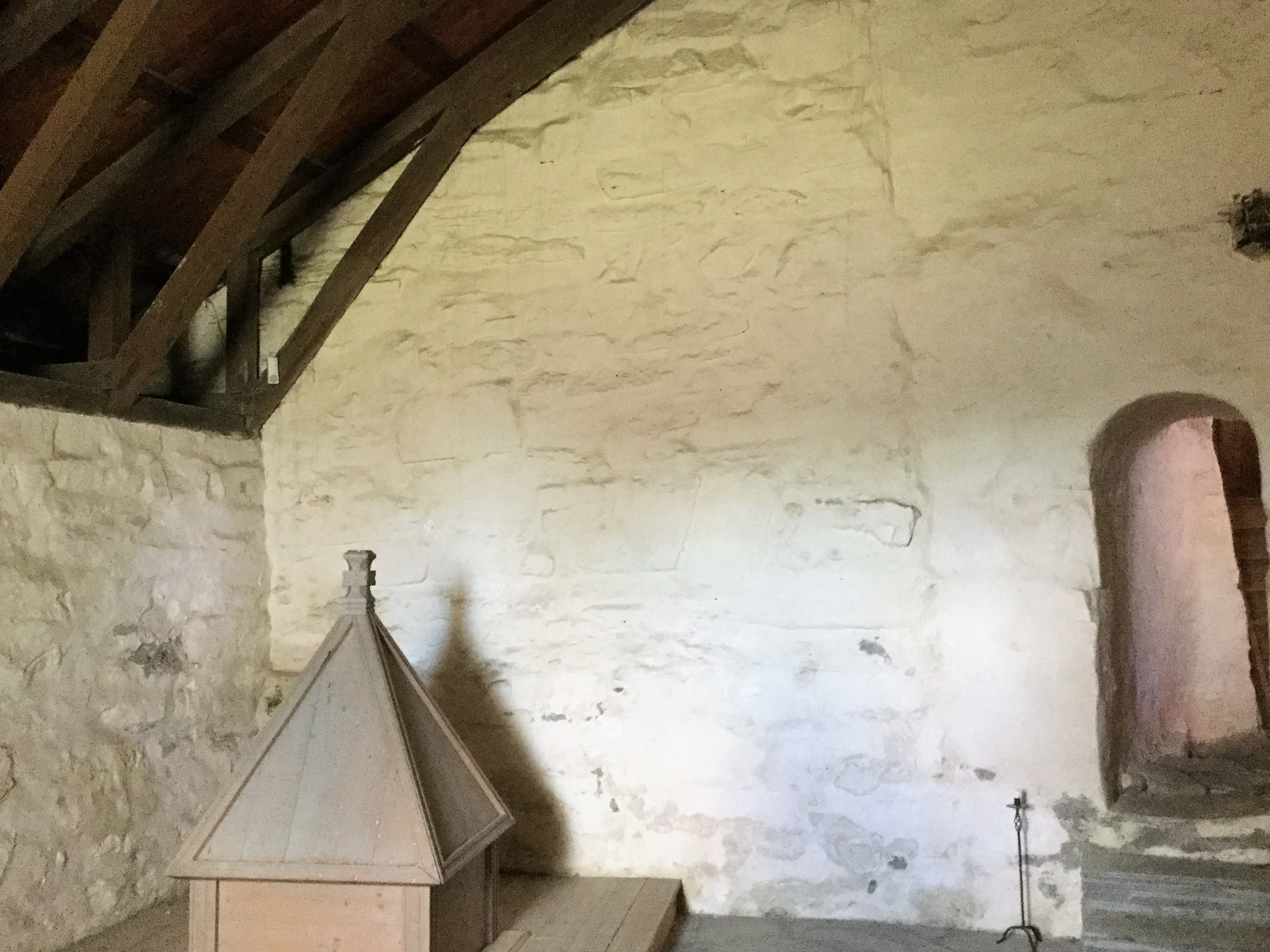 Sakristiet i Sakshaug gamle kirke med brønn